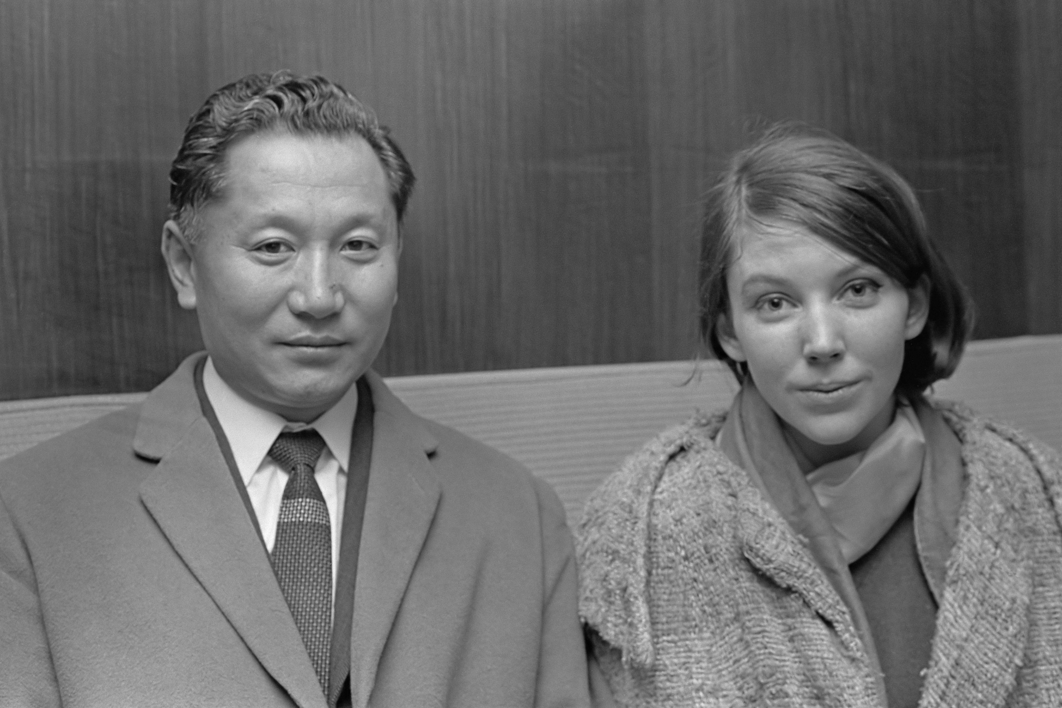 Koning en koningin van Sikkim in Nederland, het paar op Schiphol 29 januari 1966